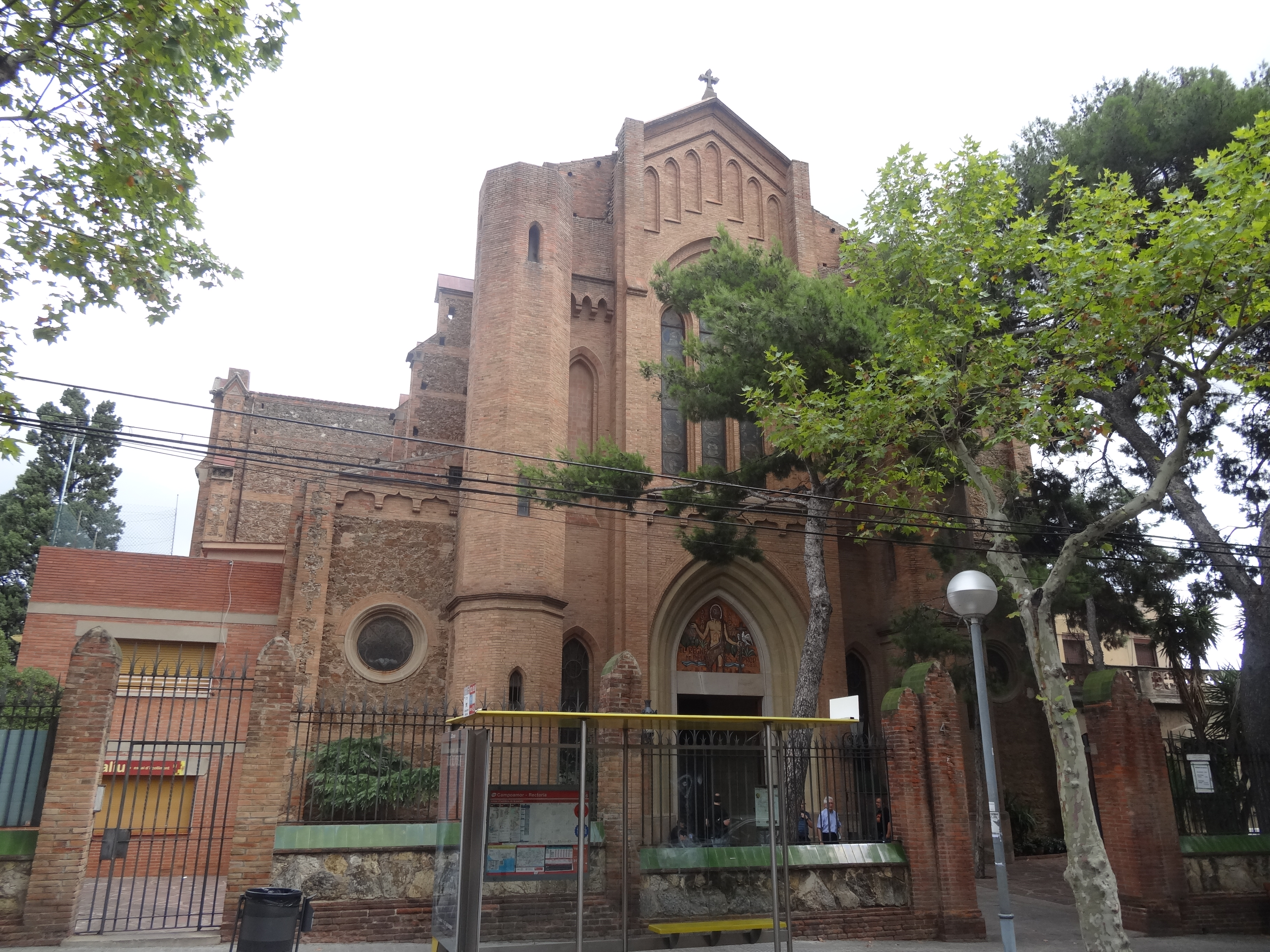 Església de Sant Joan d'Horta (carrer Campoamor, barri d'Horta, Barcelona).